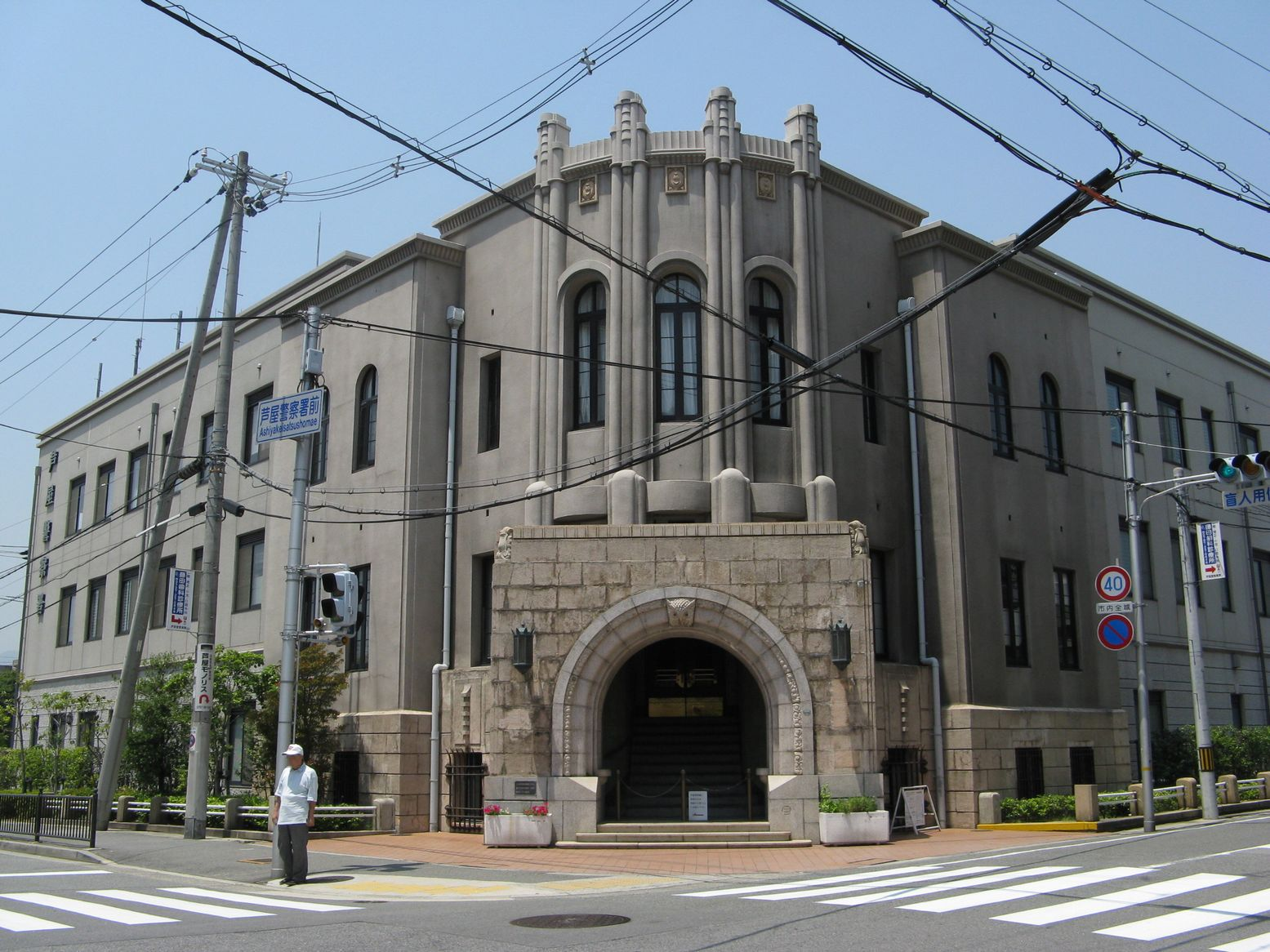 1927年竣工の芦屋警察署旧庁舎玄関